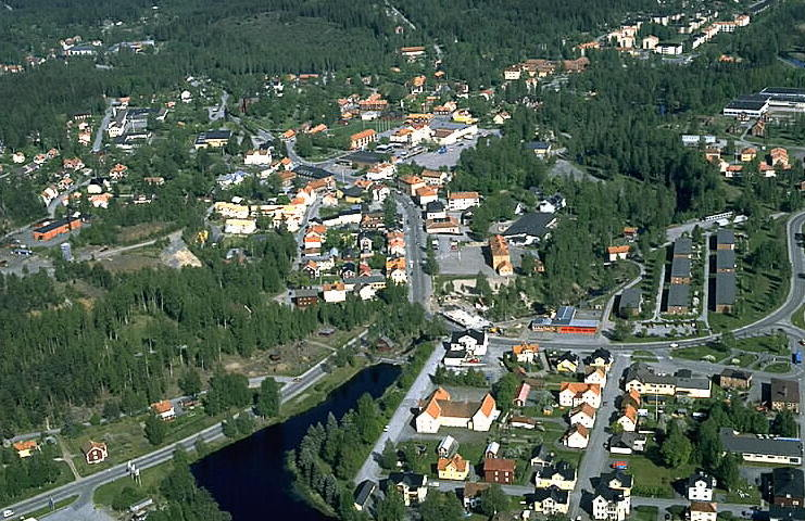 Motiv: Kopparberg Nyckelord: Flygbilder, Riksintressen Kategori: Miljöer, TätortKopparberg